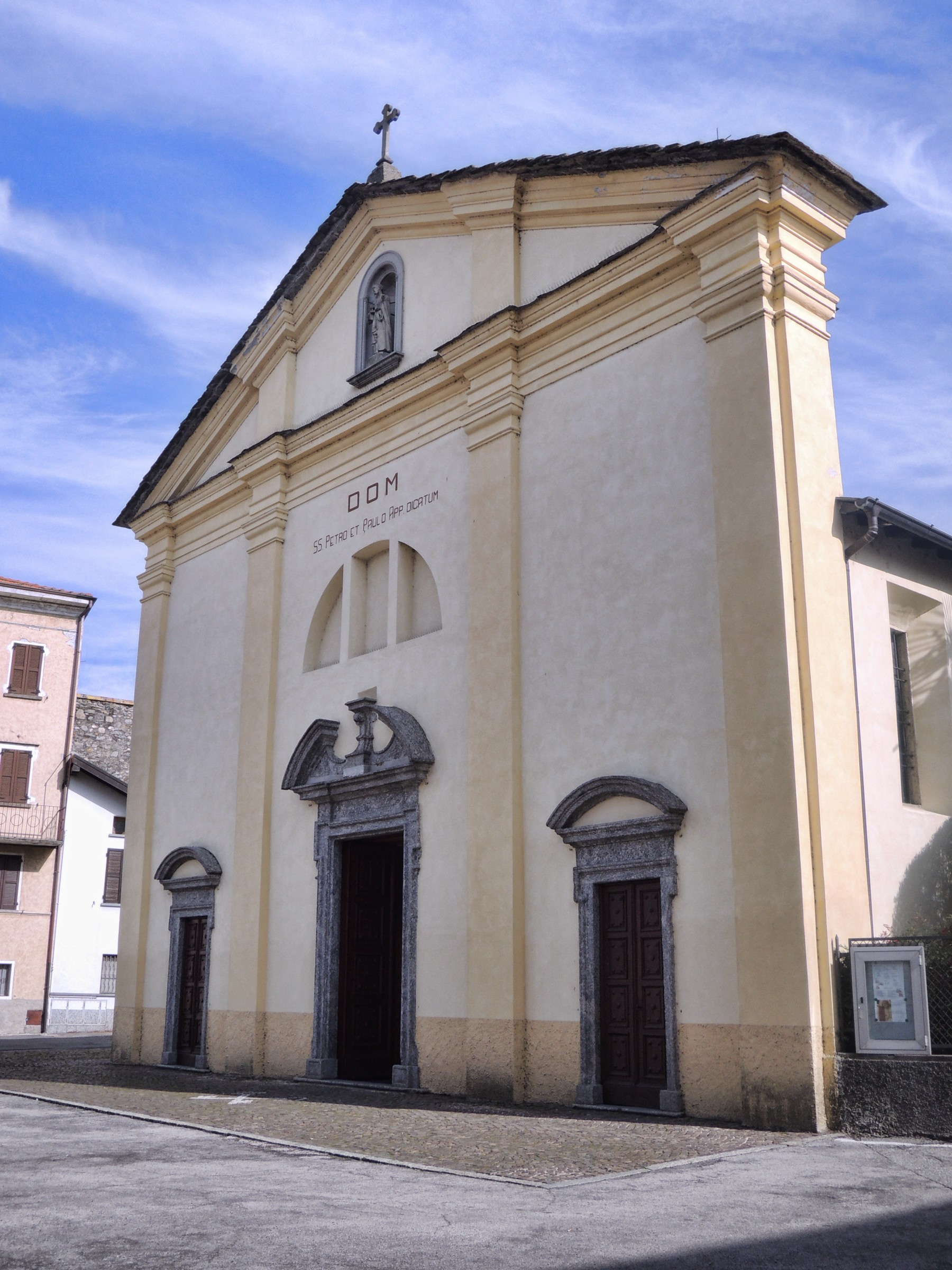 Dervio. Chiesa dei Santi Pietro e Paolo